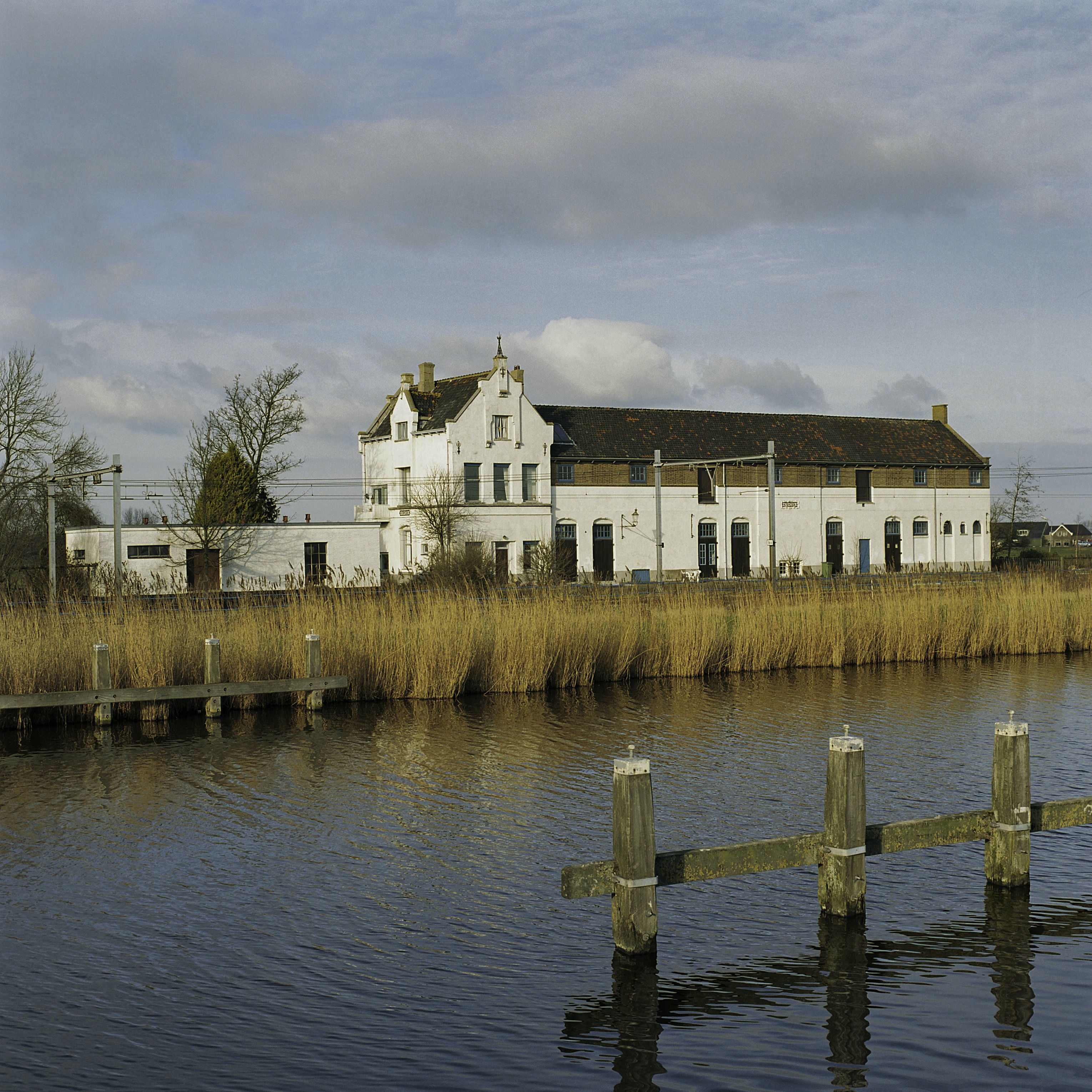 Voormalig Station: Overzicht voormalig station vanuit het zuidwesten gezien (opmerking: Gefotografeerd voor Monumenten In Nederland Noord-Holland)